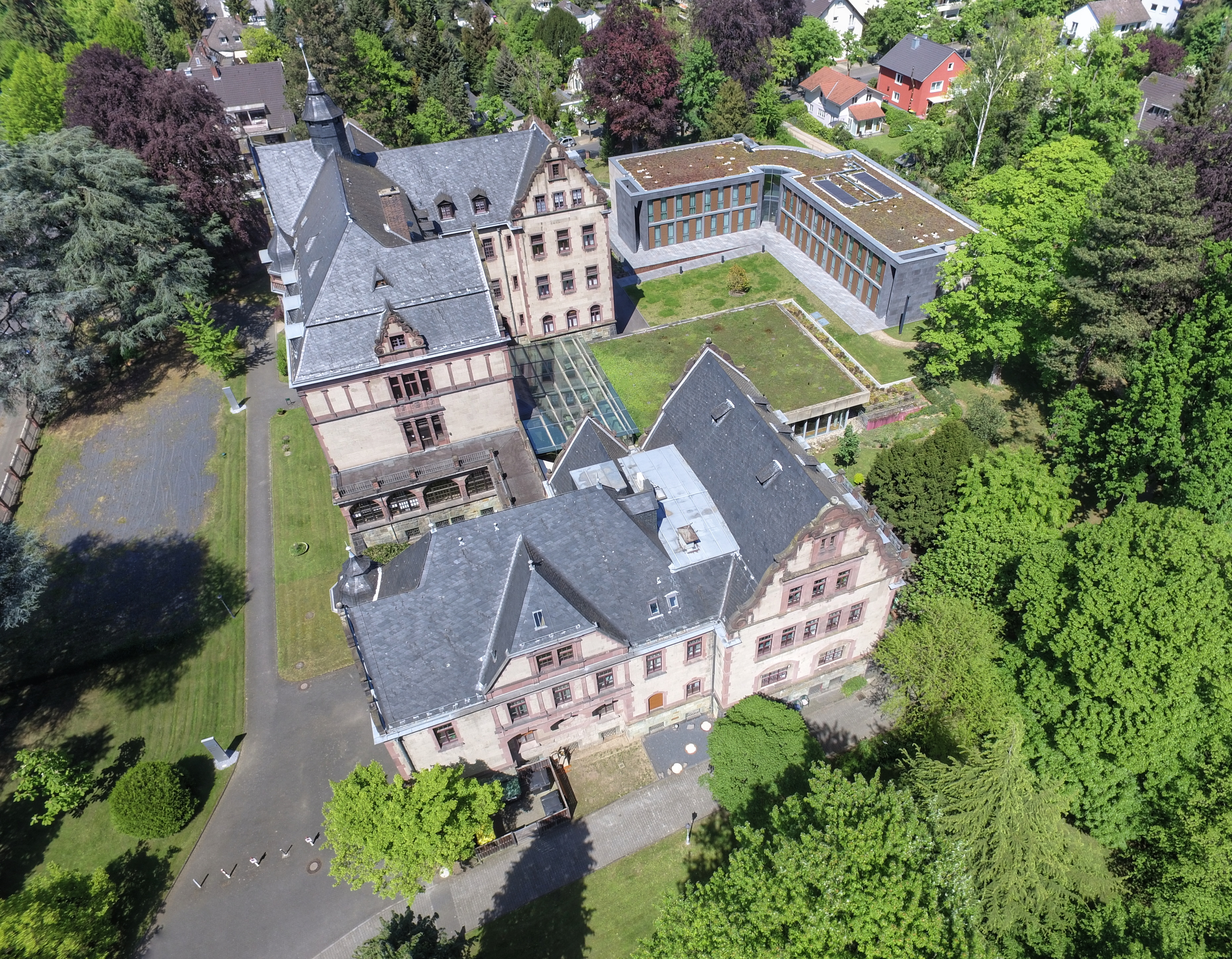 Physikzentrum Bad Honnef mit Hölterhoffstift (im Vordergrund) und Gästehaus (hinten)